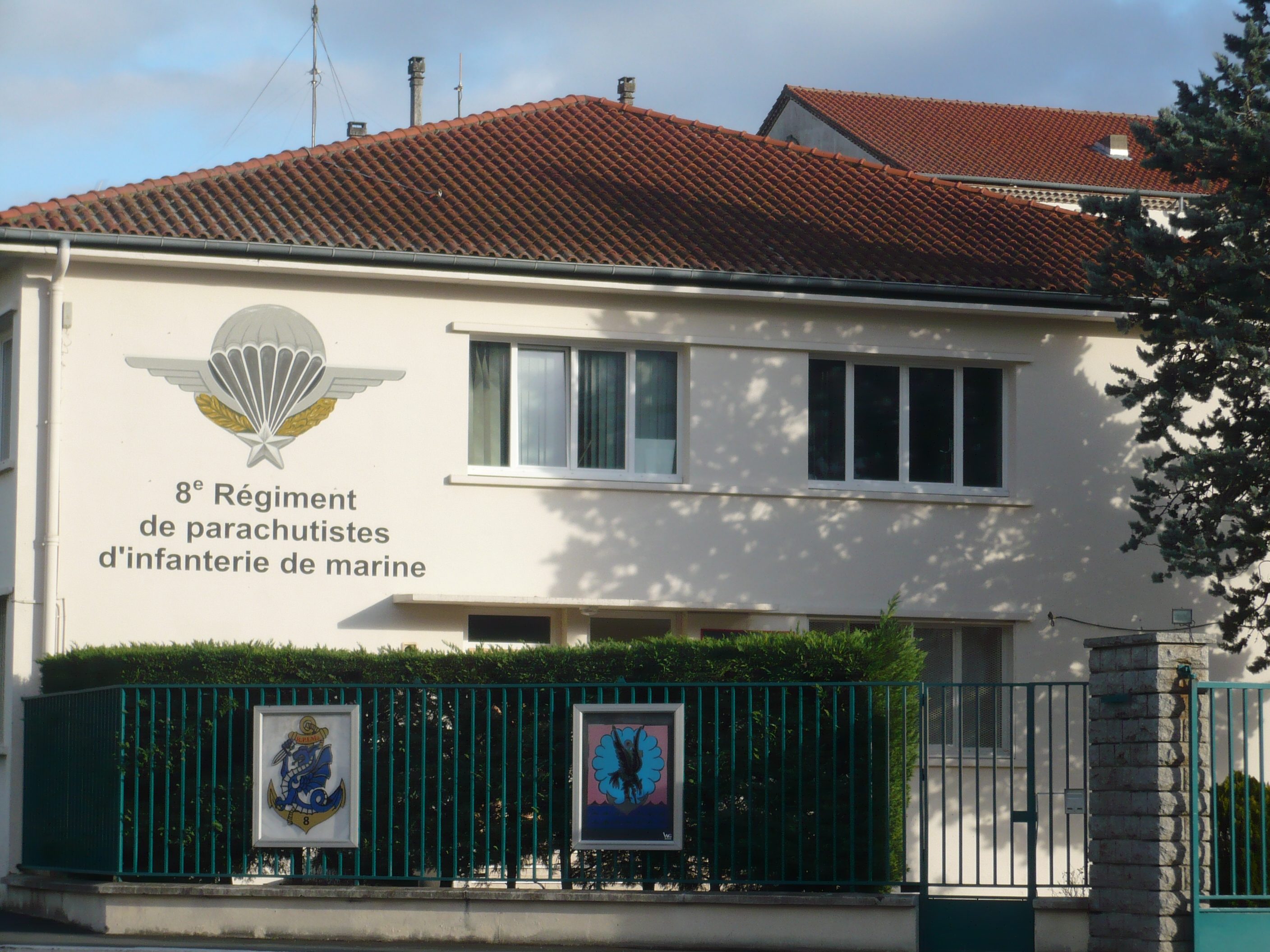 Entrée du 8e RPIMa à Castres dans le département français du Tarn.